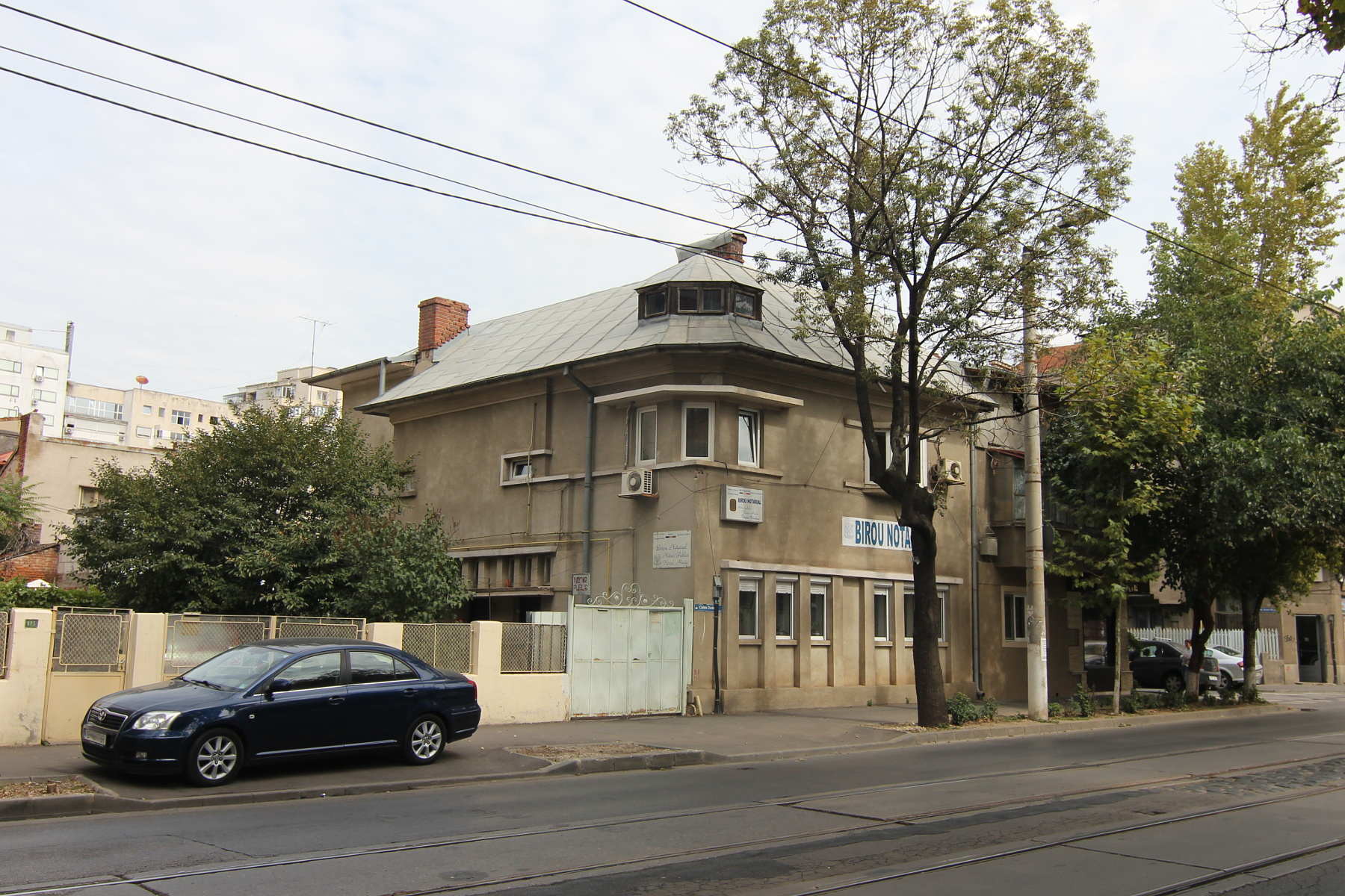 Casă pe Dudești